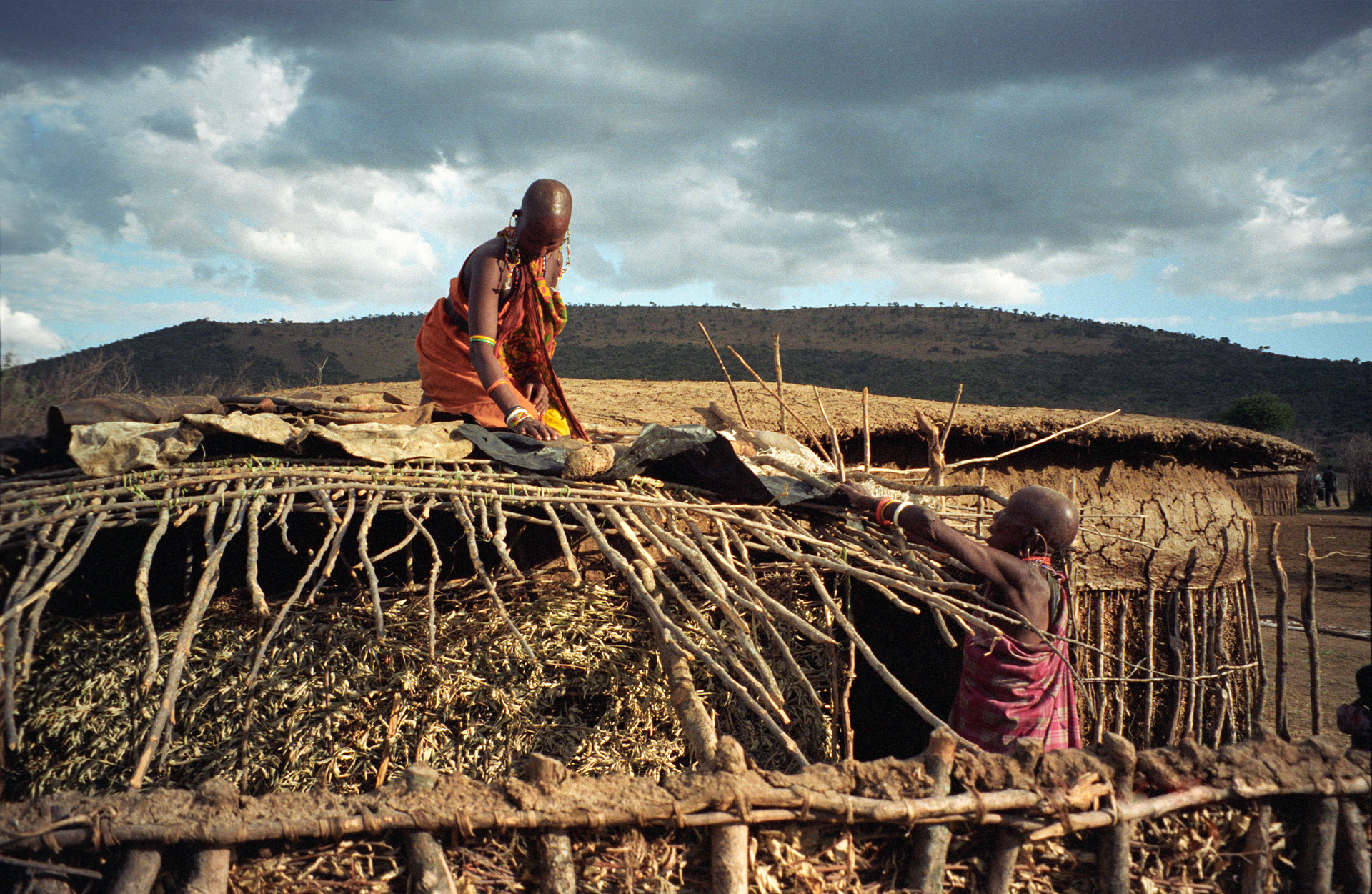 Maasai Women, Maasai Mara, Kenya